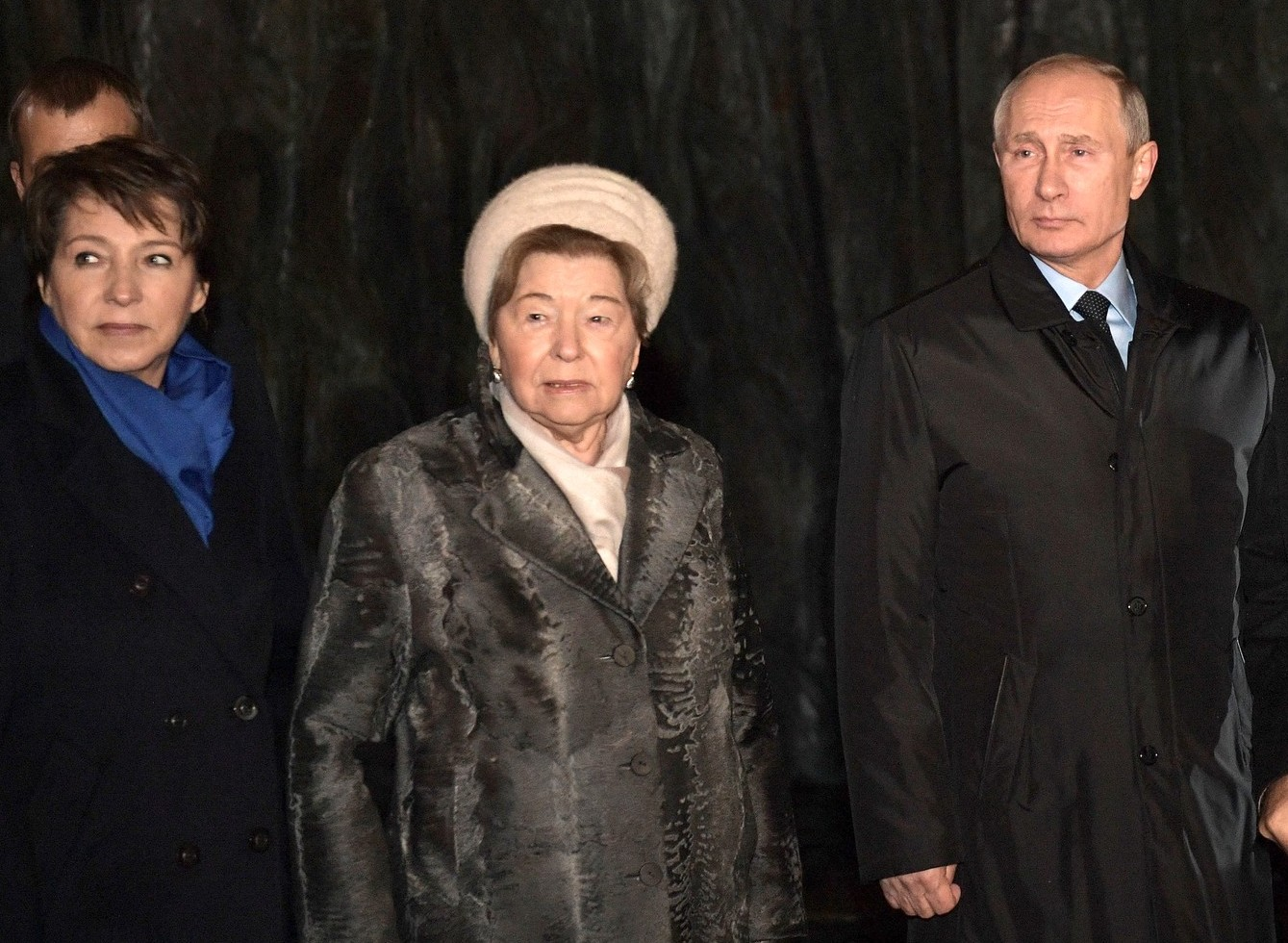 На церемонии открытия мемориала памяти жертв политических репрессий «Стена скорби». С Татьяной Юмашевой (слева), Наиной Ельциной и автором монумента «Стена скорби» скульптором Георгием Франгуляном.